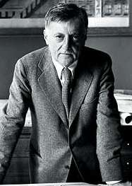 L'architetto Aldo Rossi